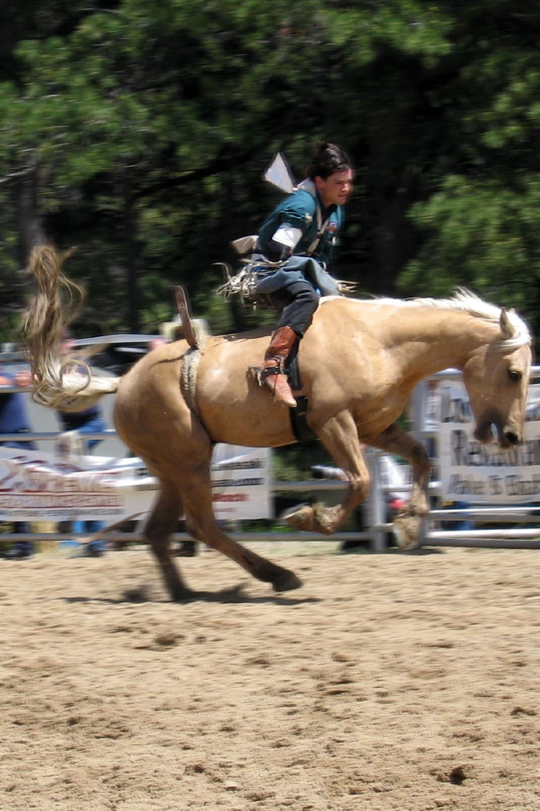 Rodeo rider